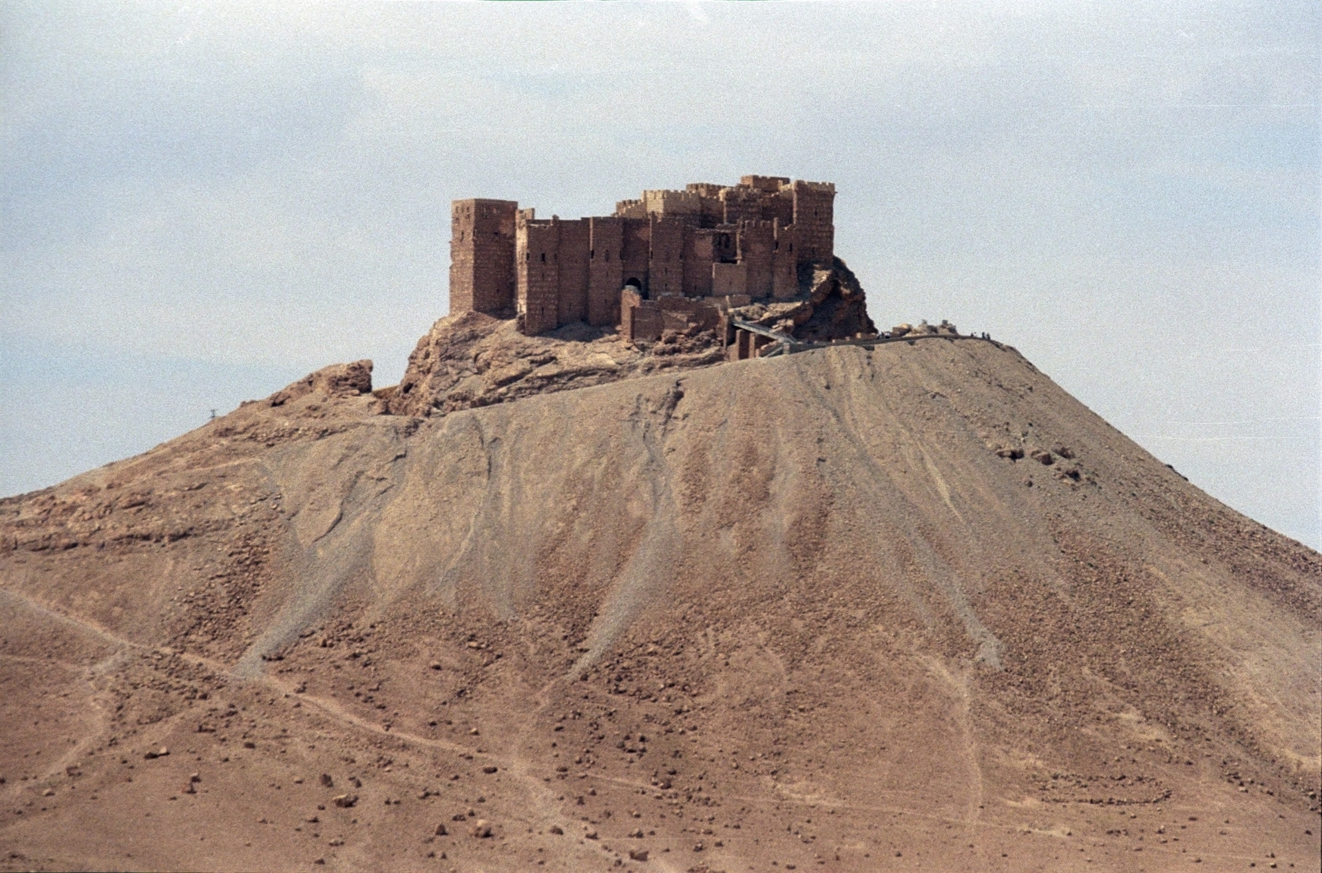 Palmyra, qalat ibn maan